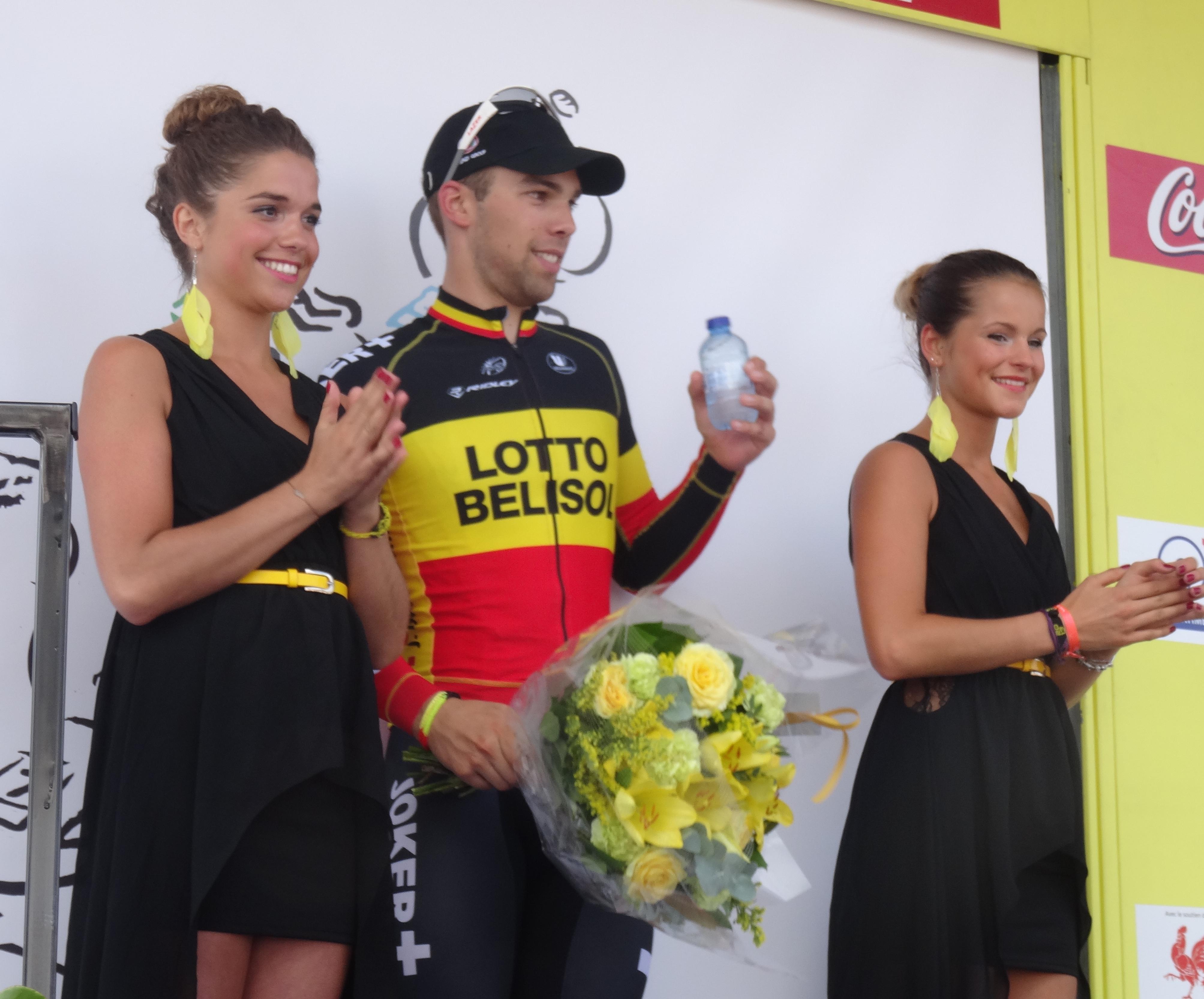 Reportage photographique réalisé le samedi 26 juillet à l'occasion de l'arrivée de la première étape du Tour de Wallonie 2014 à Rumillies, Belgique.